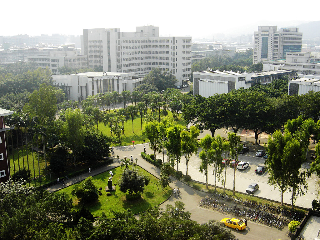 輔大校園鳥瞰